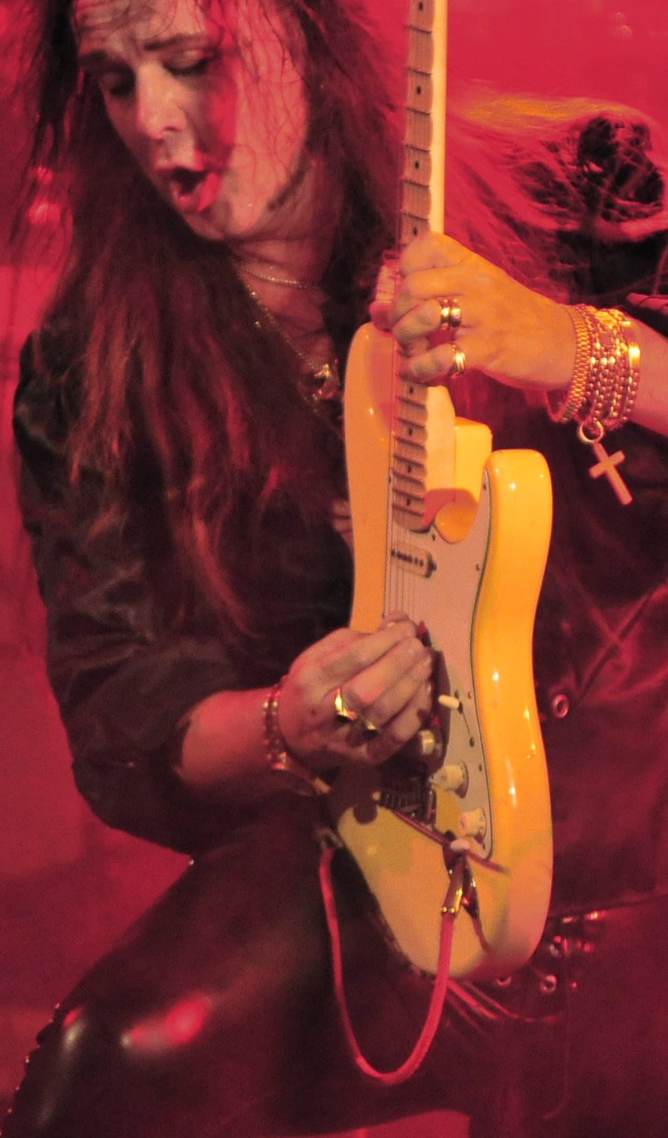 Concierto de Yngwie Malmsteen en la sala Apolo de Barcelona